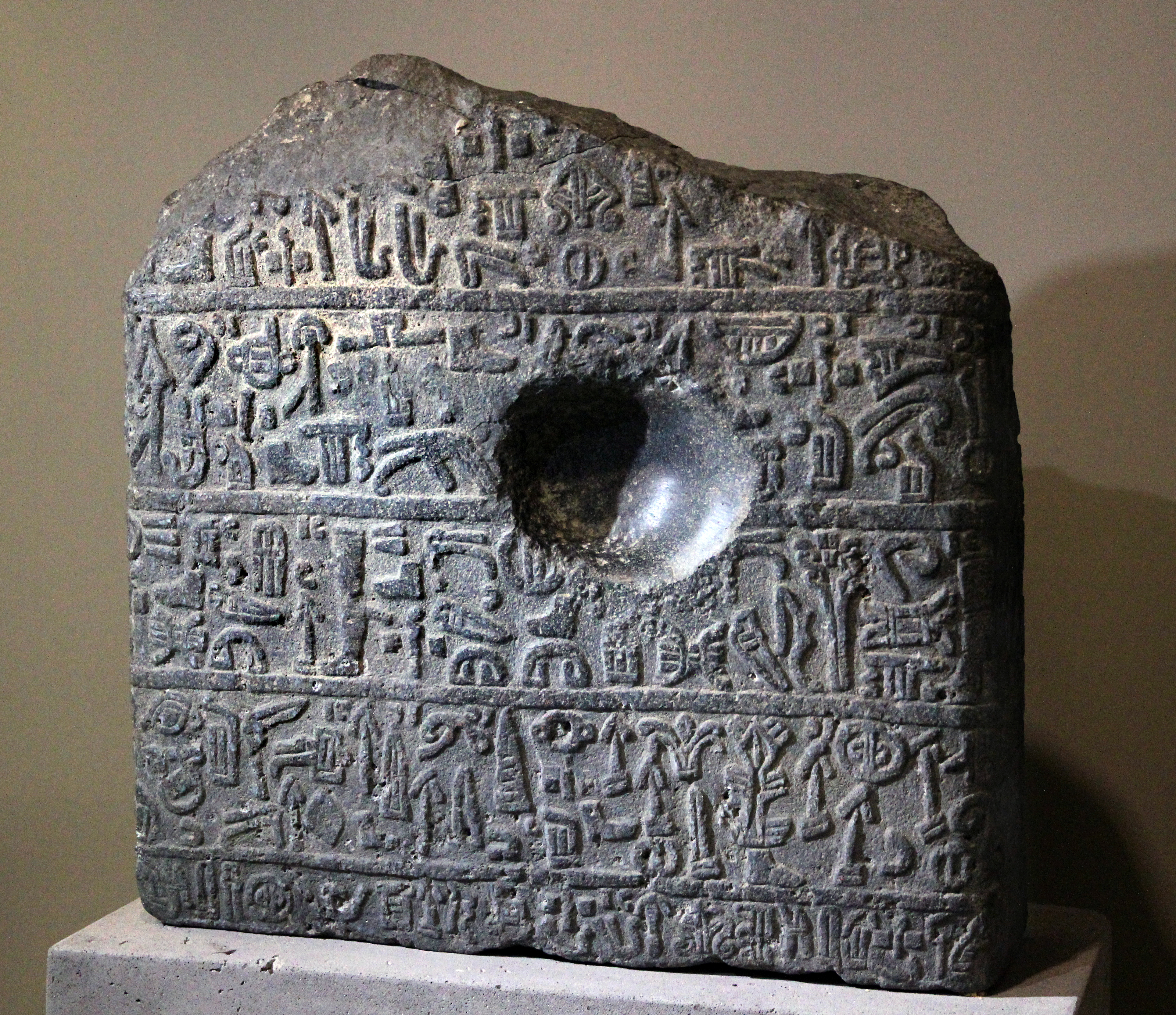 Museum Aksaray, Türkei, späthethitische Stele von Aksaray